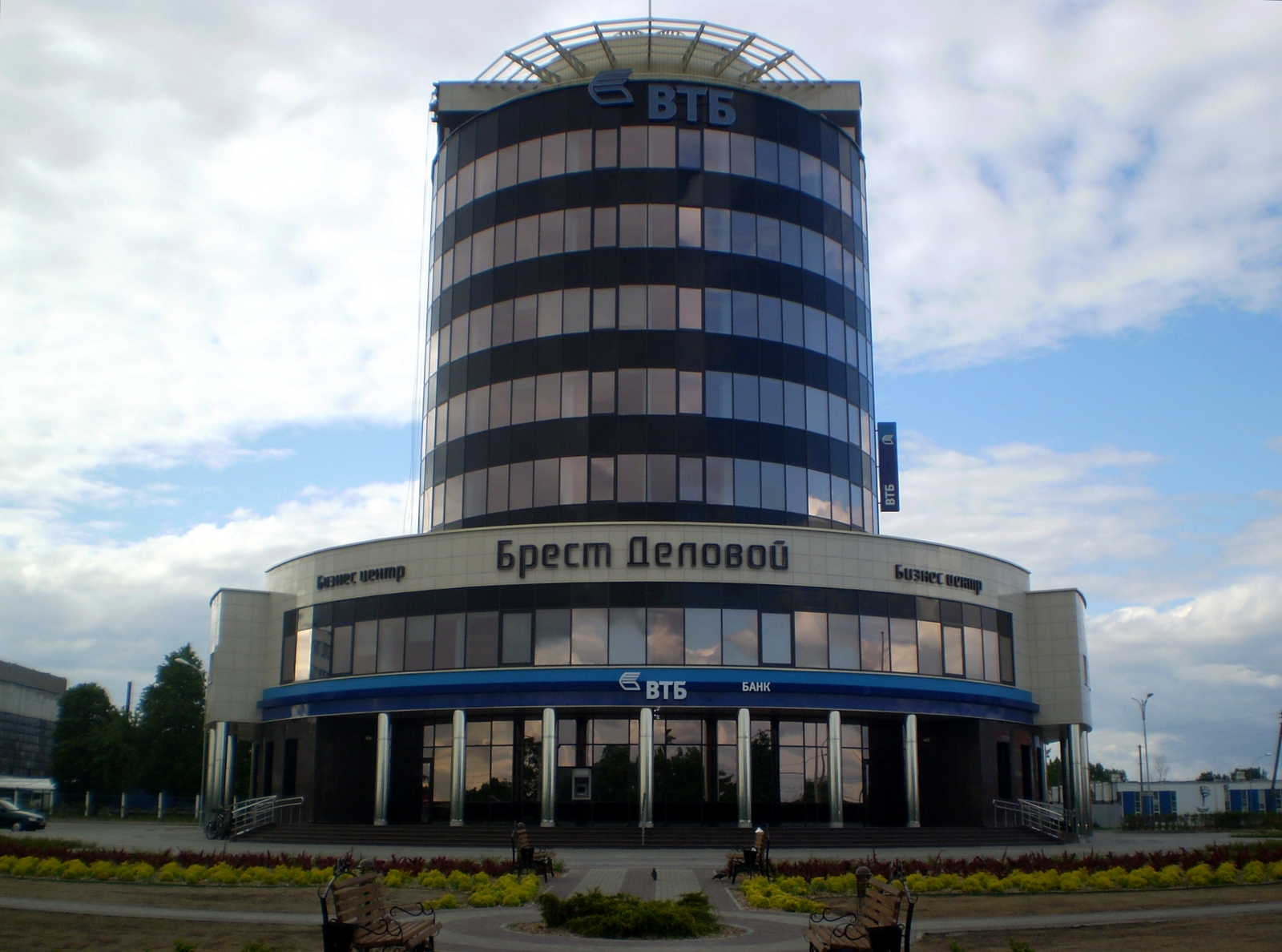 Брэст дзелавы